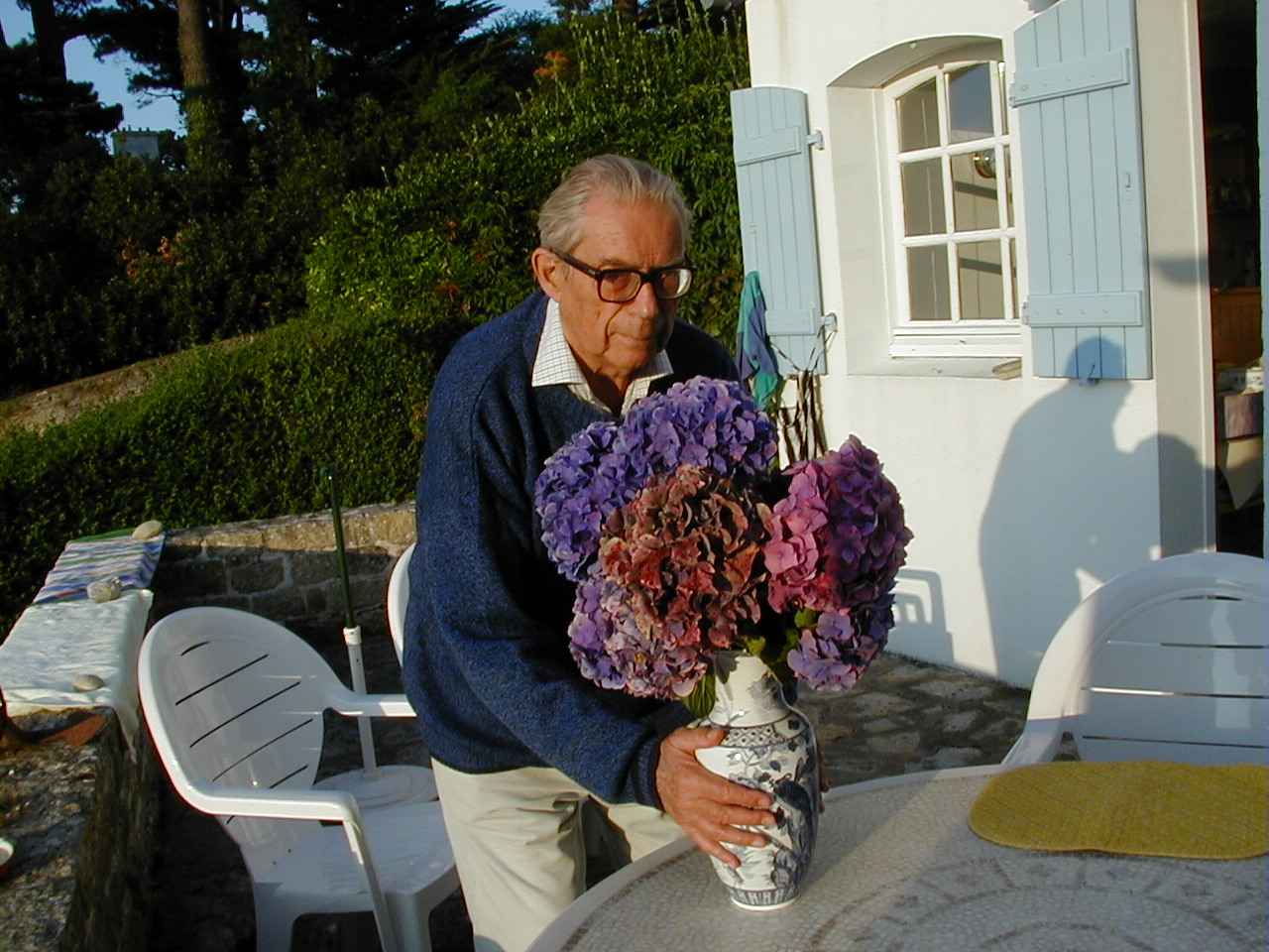 Claude Pascal - Compositeur (1921-2017)